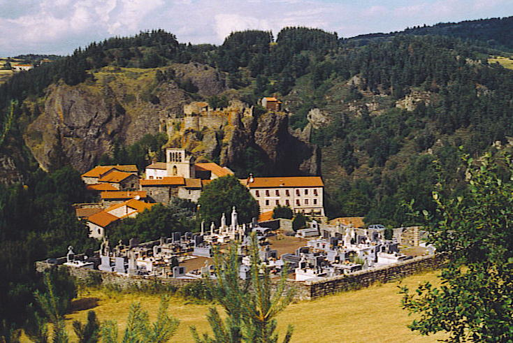 propre photo